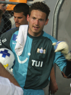 Johnny Leoni, FCZ, Hardturm Stadion (Schweiz), Pokal Halbfinale, FC Zürich - FC Luzern 2:3